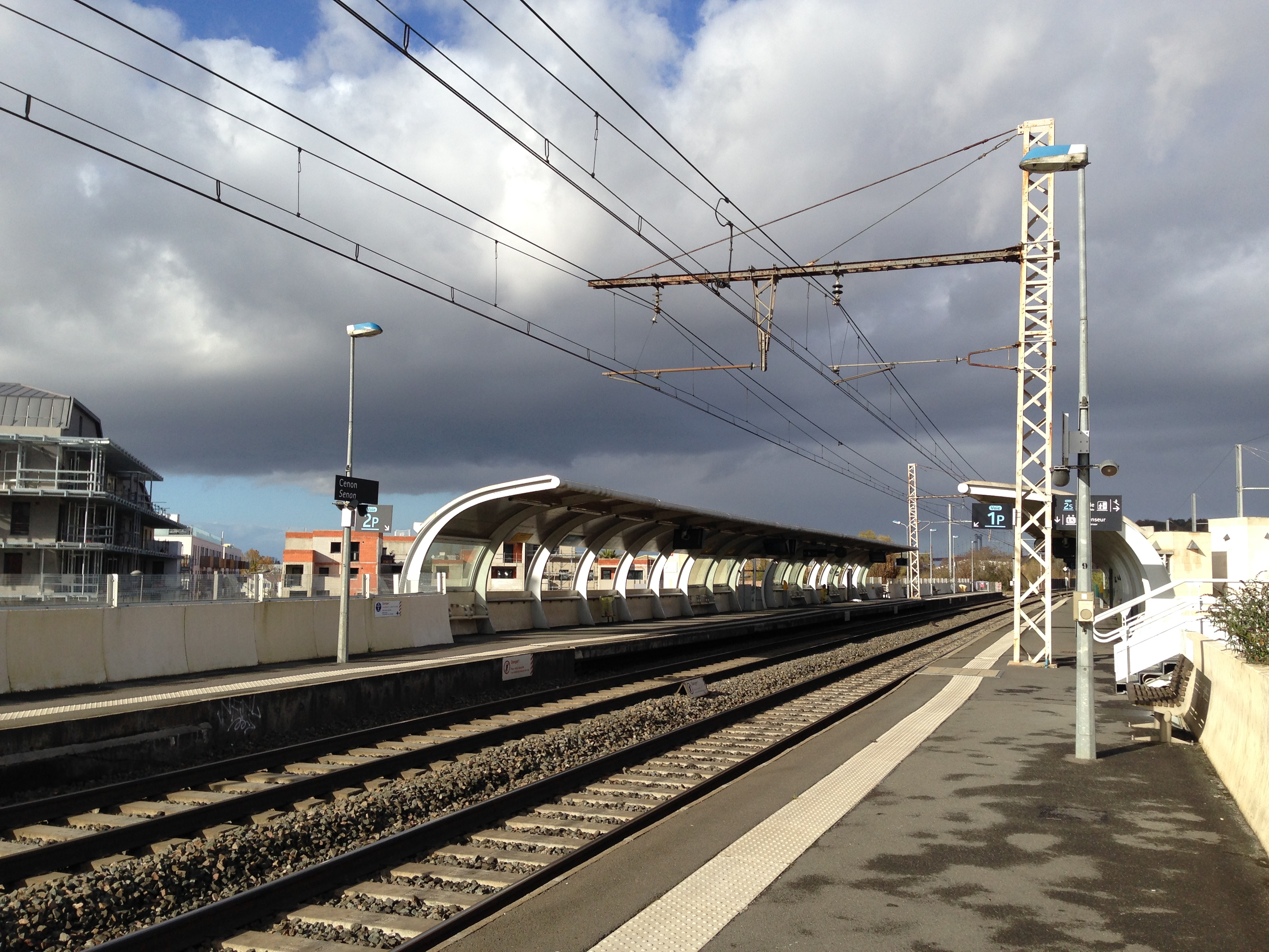 Quai de la gare de Cenon